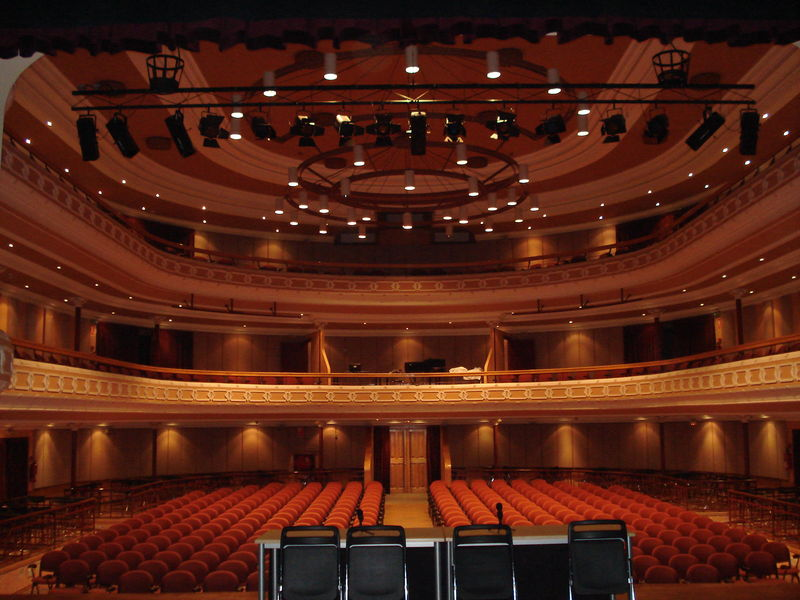 Teatre de l'Ateneu de Sant Celoni. foto ZztopzZ